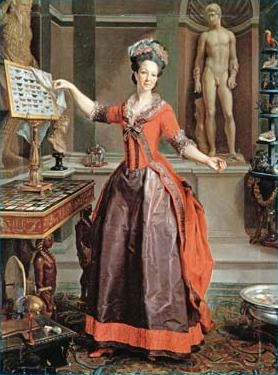 Ritratto di Margherita Sparapani Gentili Boccapadule (1735-1820)